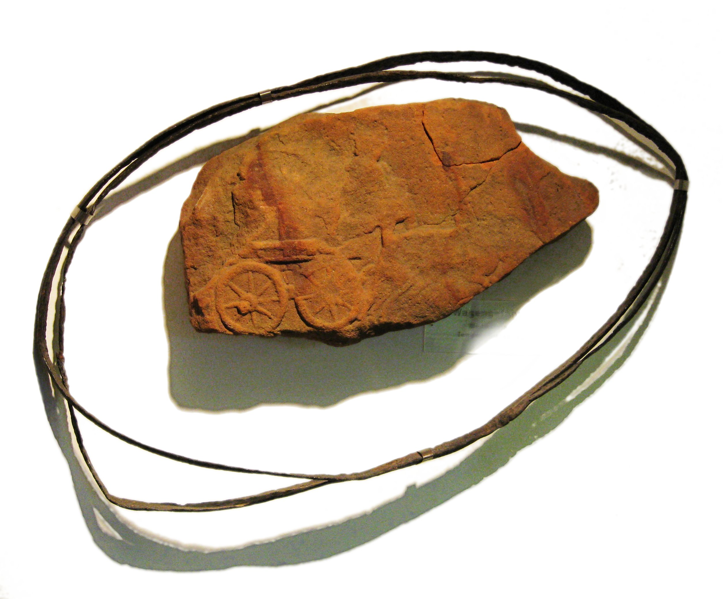 Radreifen im Römermuseum Schwarzenacker